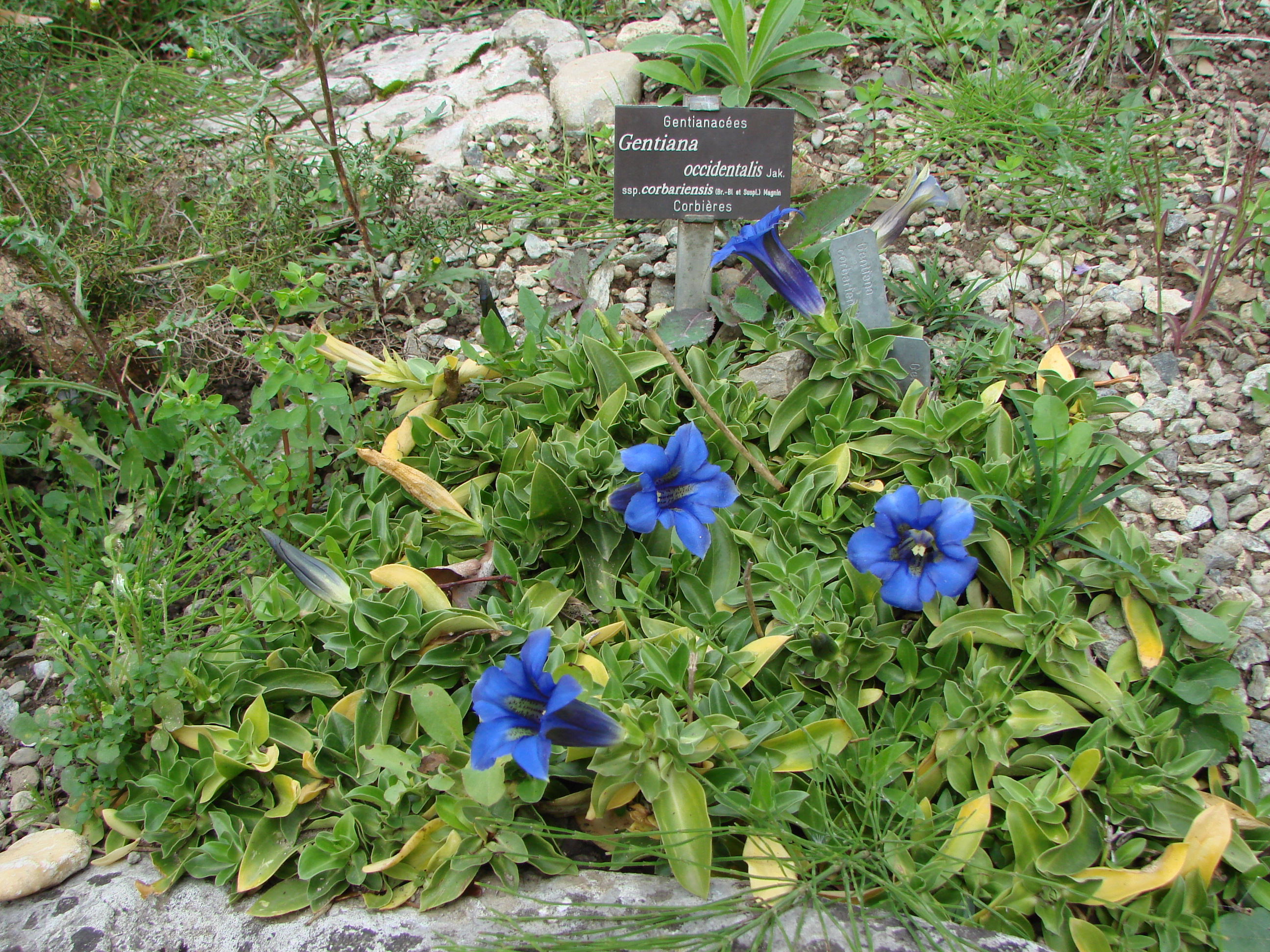 Gentiana occidentalis ssp. corbariensis (Braun-Blanq.) J.Magnin.